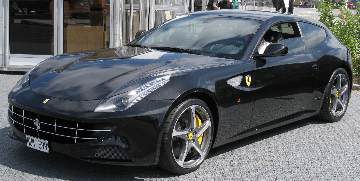 Ferrari FF